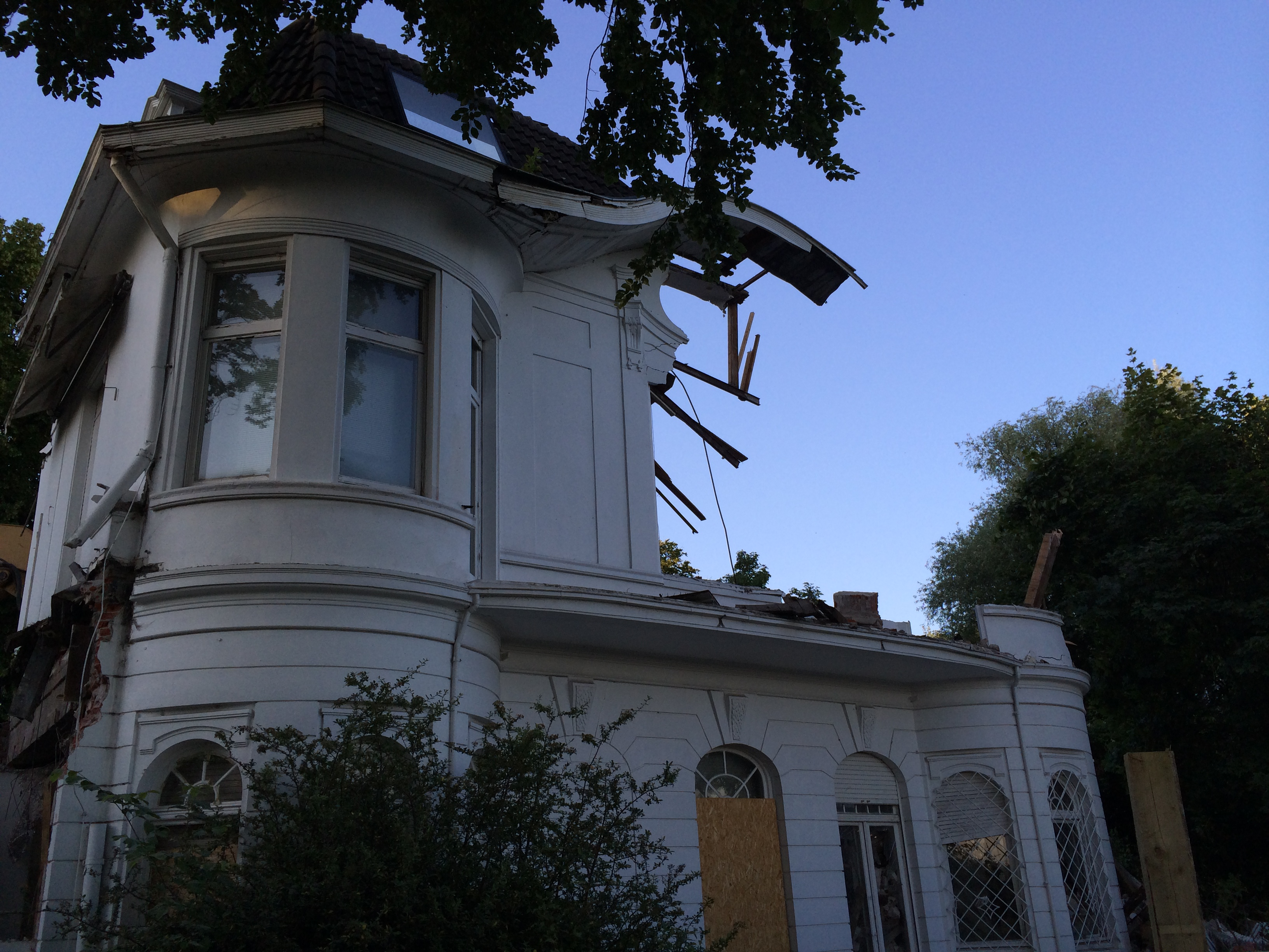 Grossner Villa in Nienstedten am 17.06.14, Elbseite